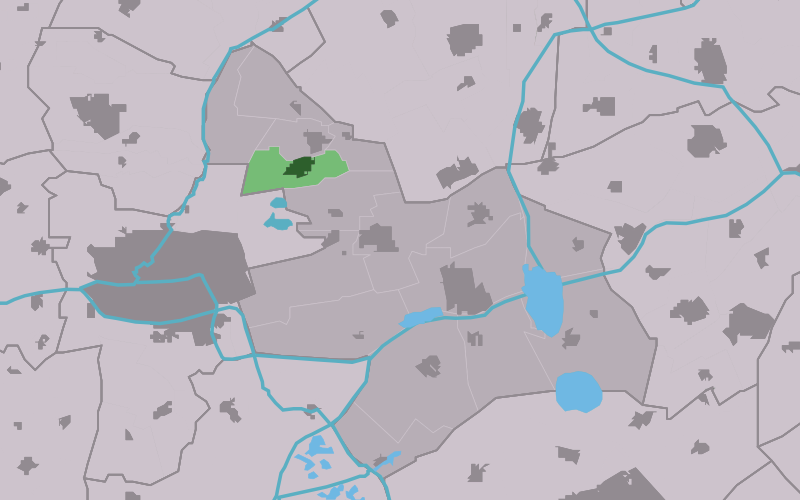 Kaartsje fan himrik fan Gytsjerk